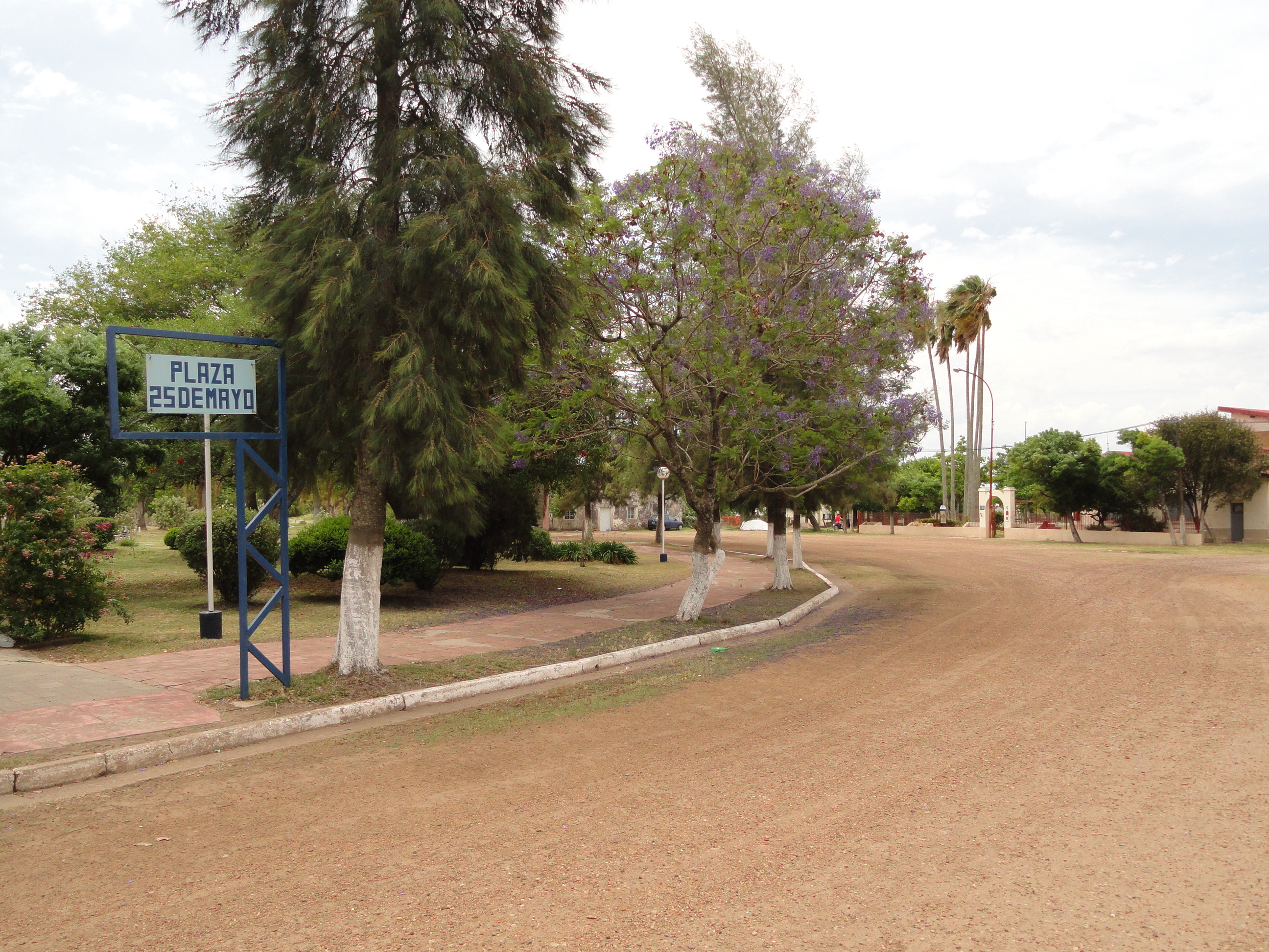 Plaza 25 de Mayo in Villa Dominguez.